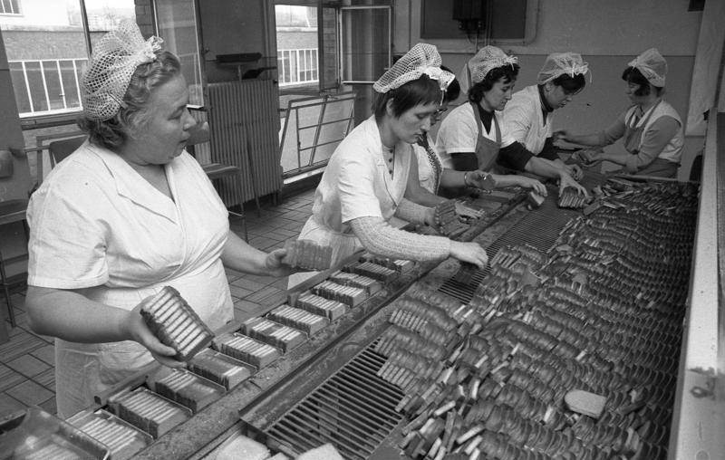 Carl Brandt, Zwieback und Bisquit GmbH. Hagen/Westf.